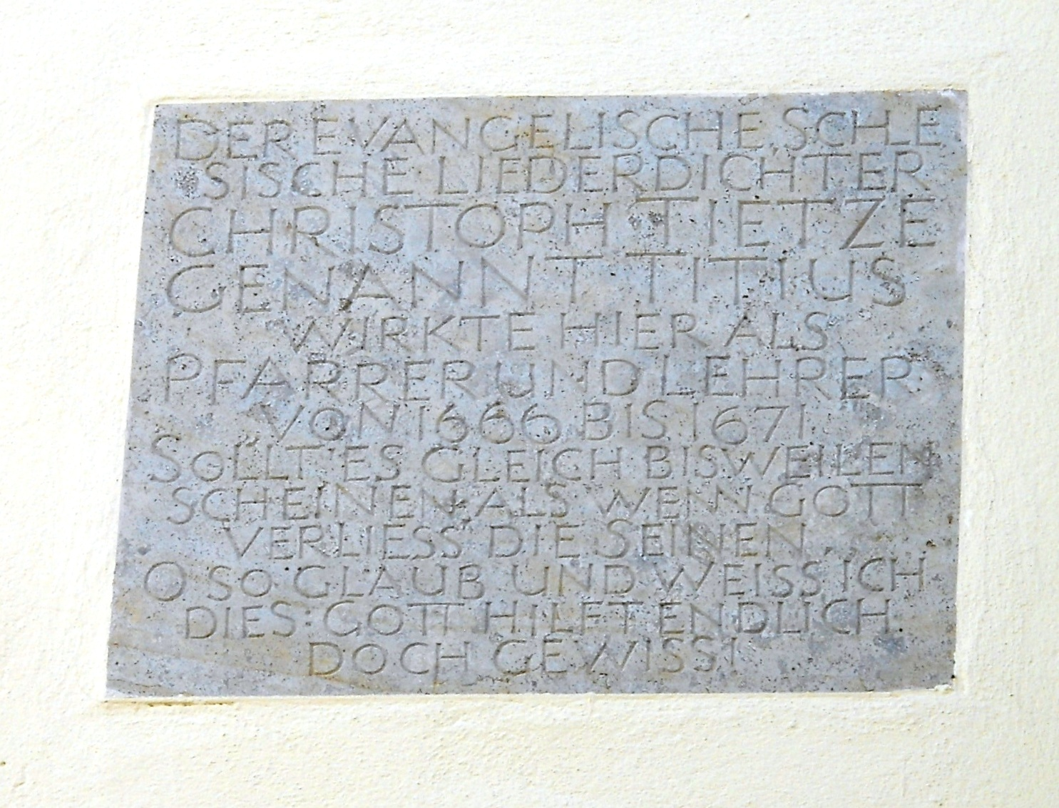 Laubenzedel, Ortsteil von Gunzenhausen im Landkreis Weißenburg-Gunzenhausen (Bayern), Evang.-luth. Pfarrhaus, Christoph Titius-Gedenktafel